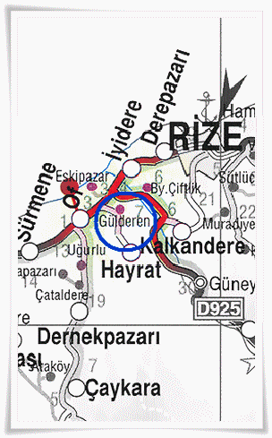 Gülderen köyü konumu